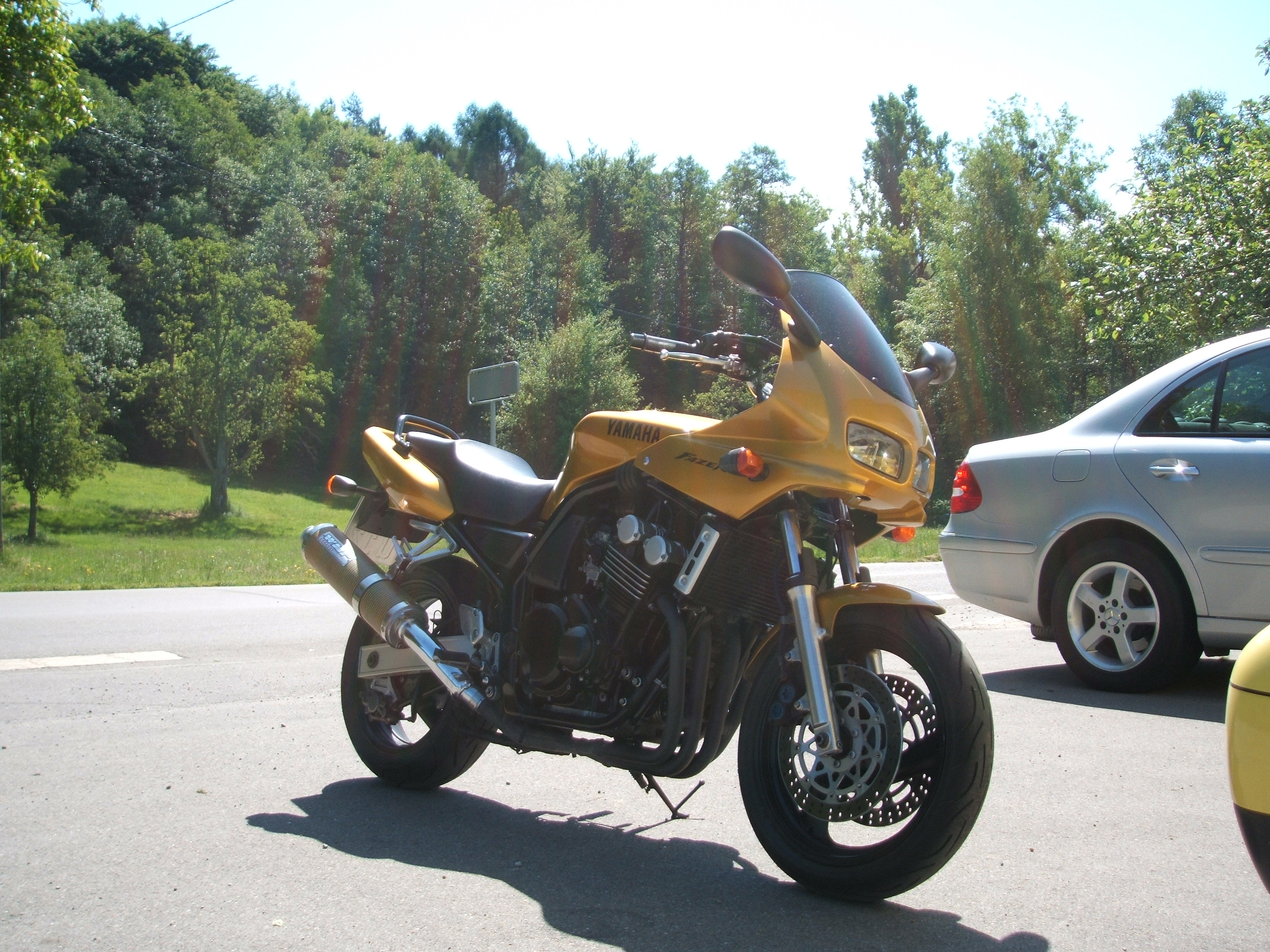 Yamaha Fazer FZS 600 5DM1, Auspuff und dunkle Scheibe nicht original.